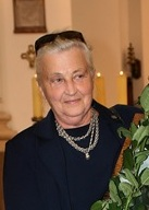 Pani profesor